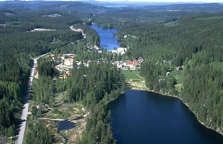 Motiv: Loka brunn Nyckelord: Flygbilder, Riksintressen Kategori: Hälsobrunn Loka brunn